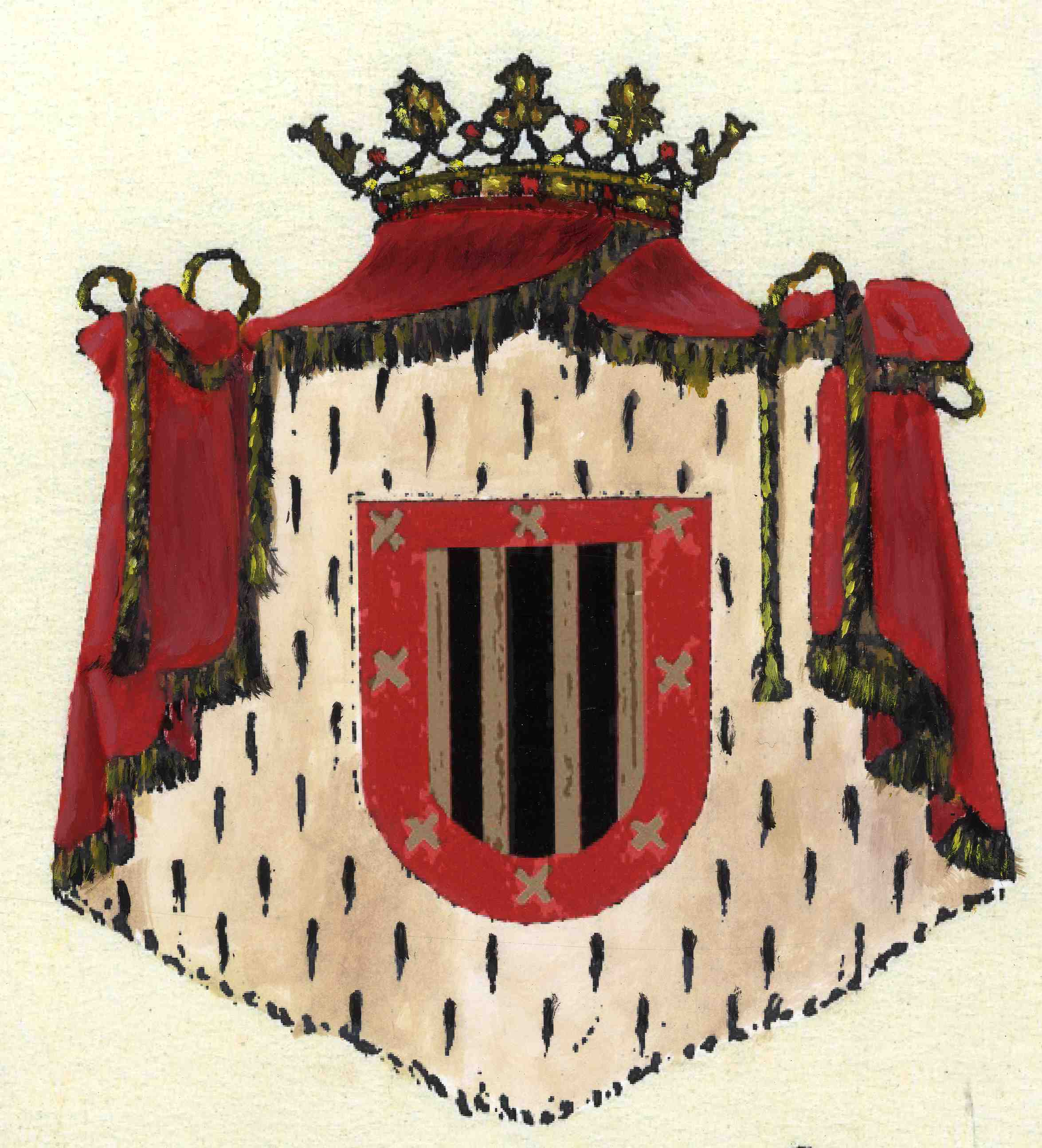 Escudo de los Condes del Campo de Alange (Casa de Negrete)